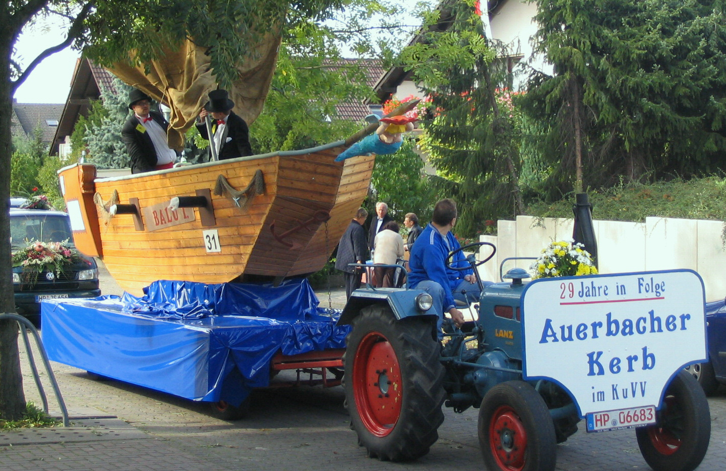 Festwagen bei Auerbacher Kirmes